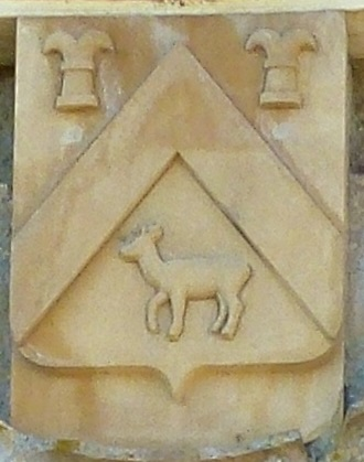 L'Échelle (Ardennes) château, portail, détail du blason